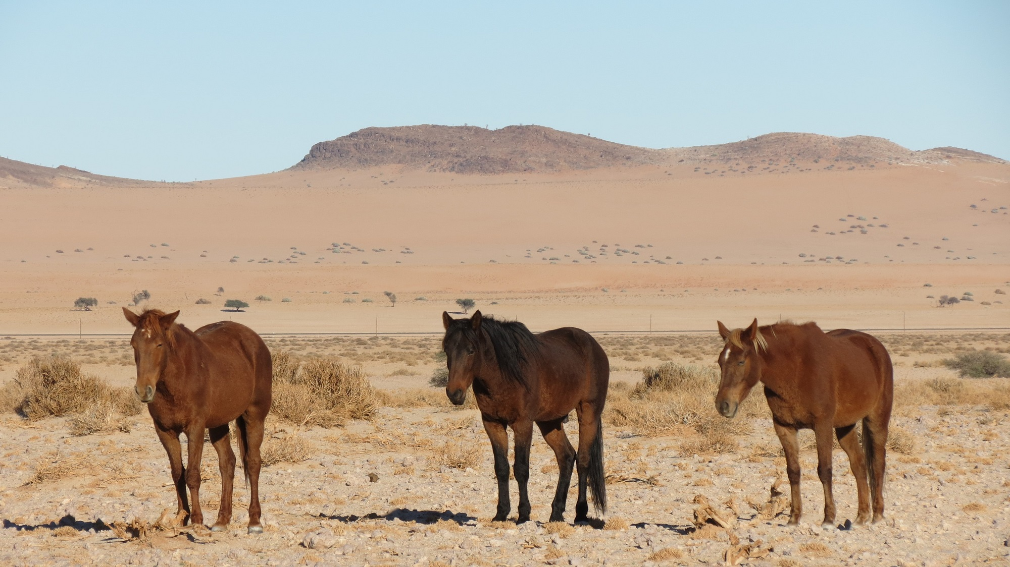 Namibische Wildpferden in Garub